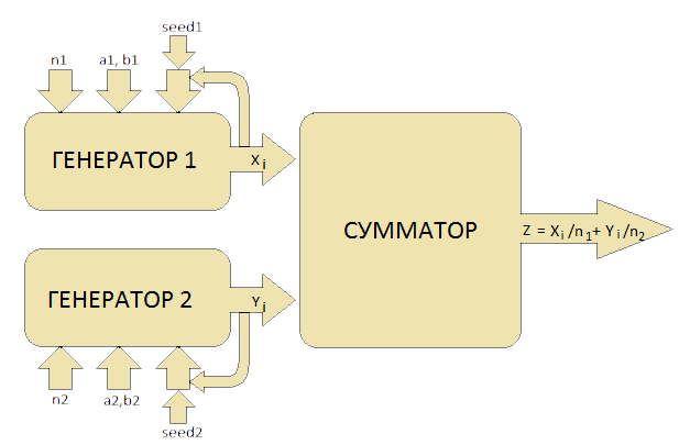 Пример объединенного инверсного конгруэнтного генератора